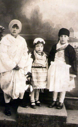 Карневалски маски од 1933 година во Струмица